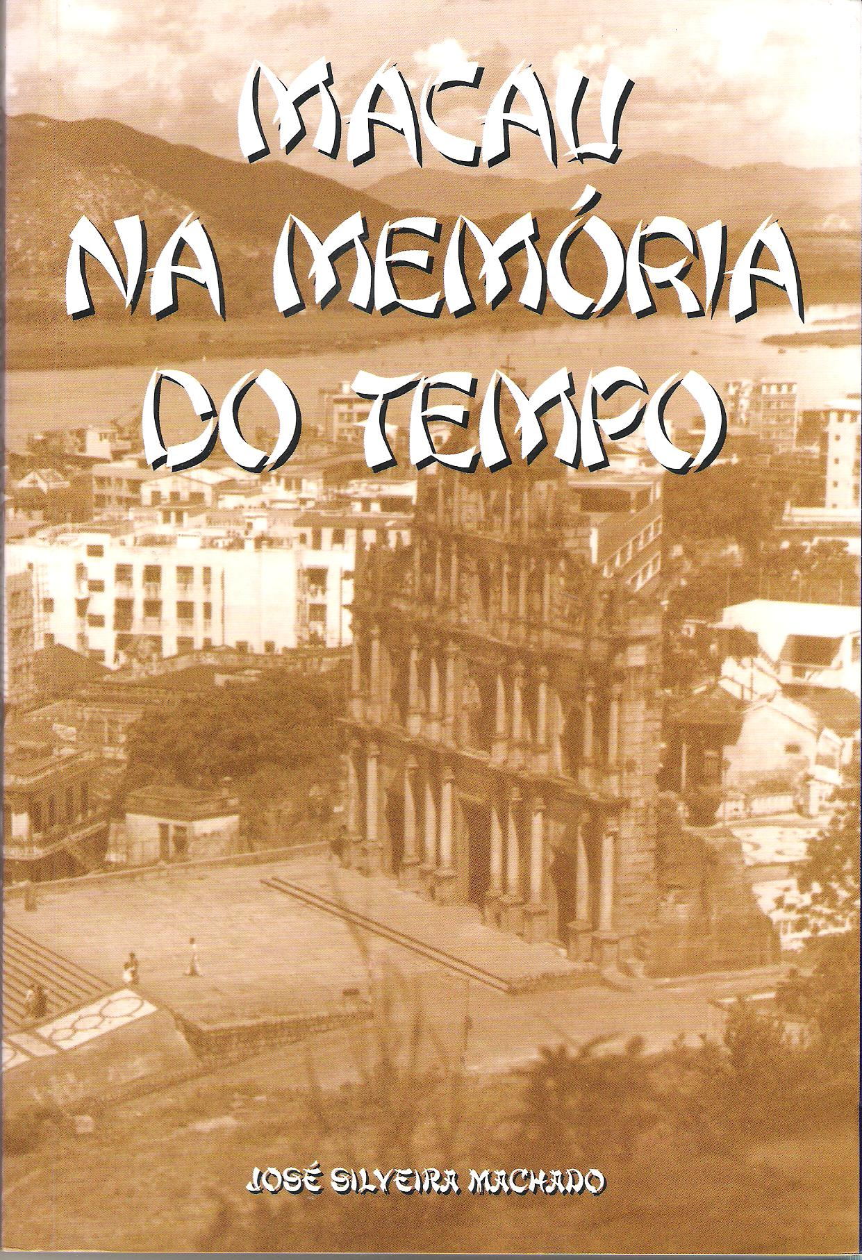 Macau na Memória do Tempo de Jose Silveira Machado -Foto da Capa do Livro 2002